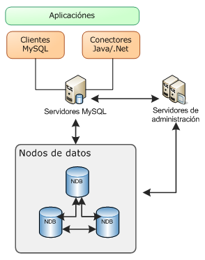 Arquitectura general de un clsuter NDB de MySQL